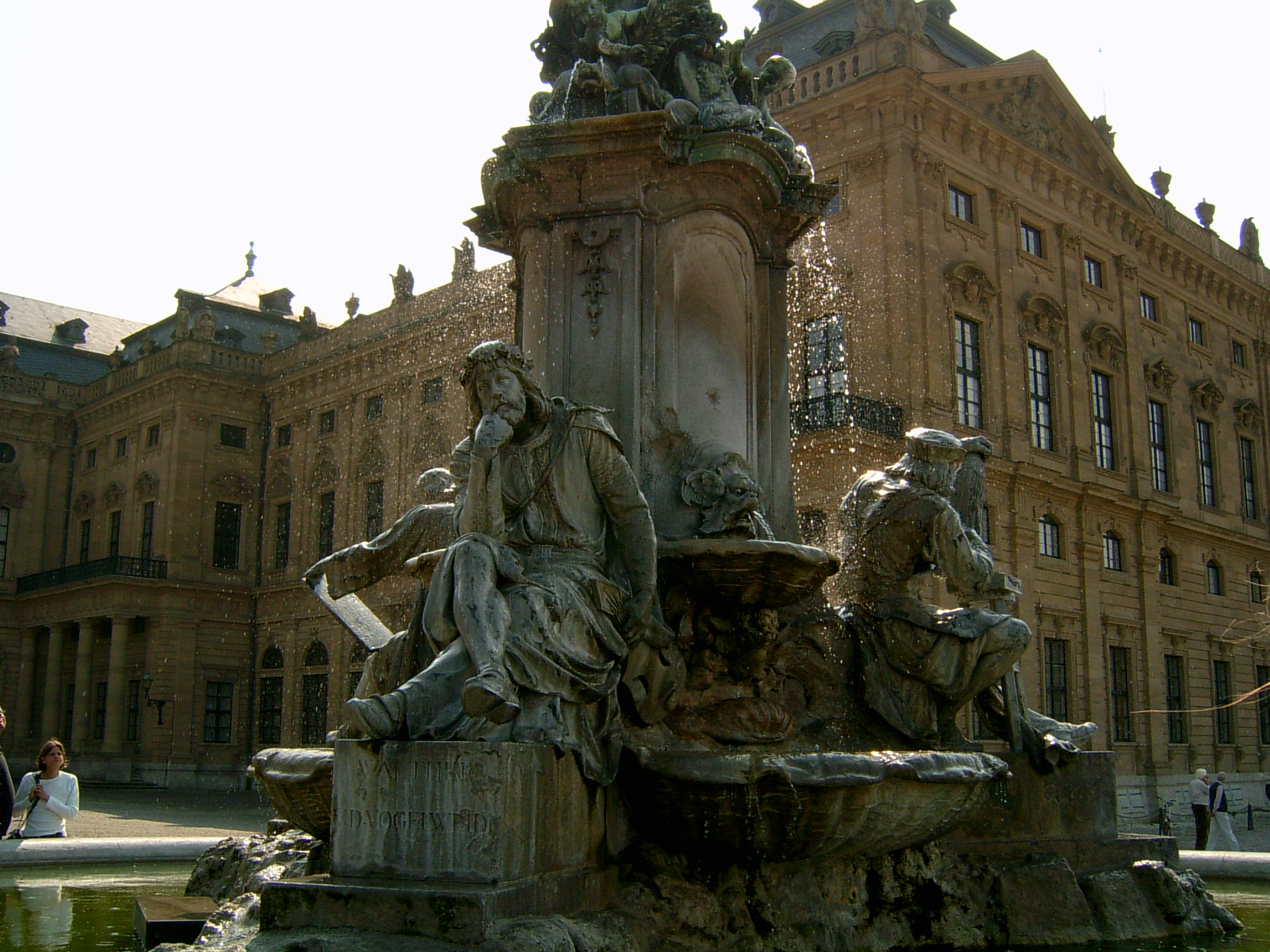 Brunnen der Würzburger Residenz in Würzburg. Ansicht Ehrenhofseite.